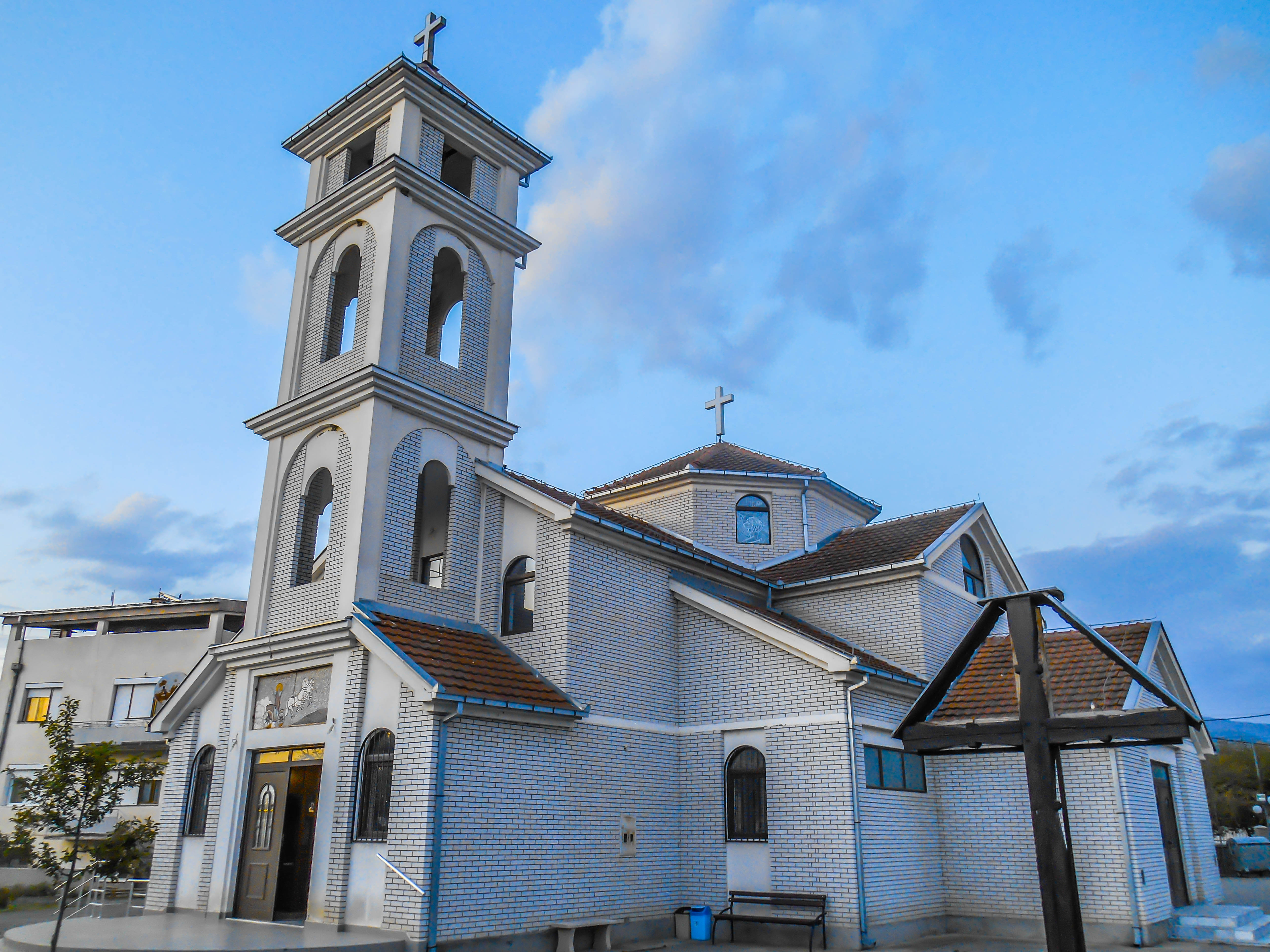 Црква „Св. Илија“ - Радово